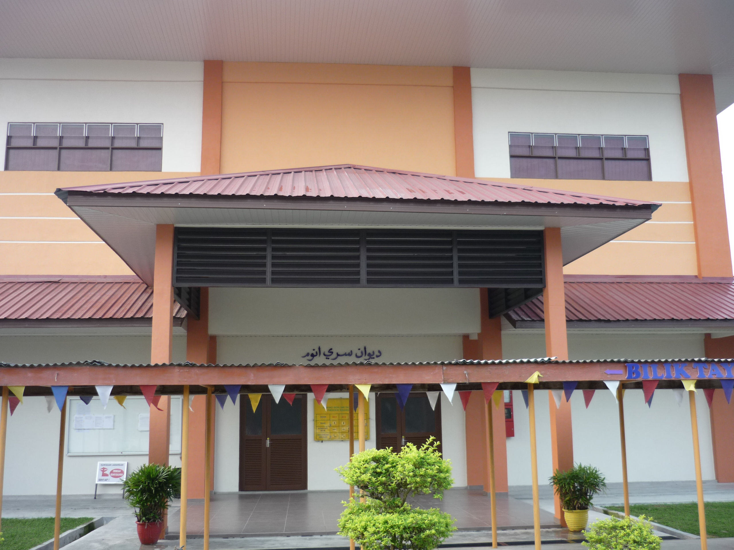 Pandangan hadapan Dewan Seri Anum